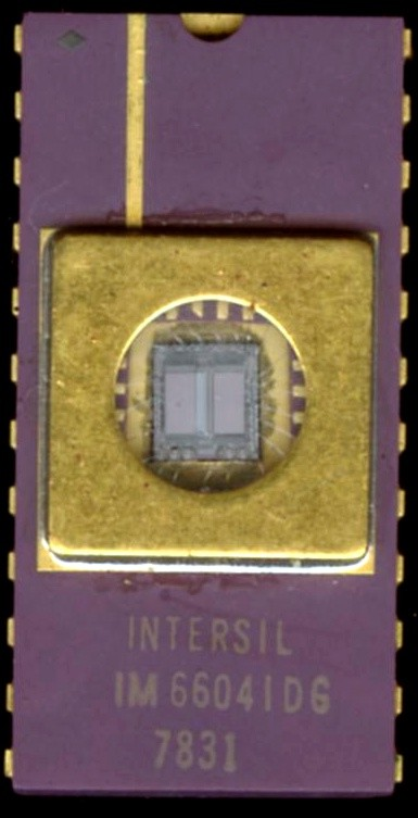 Intersil EPROM in CMOS-Technologie, 1978Unknown intersil eprom in cmos technology, 1978